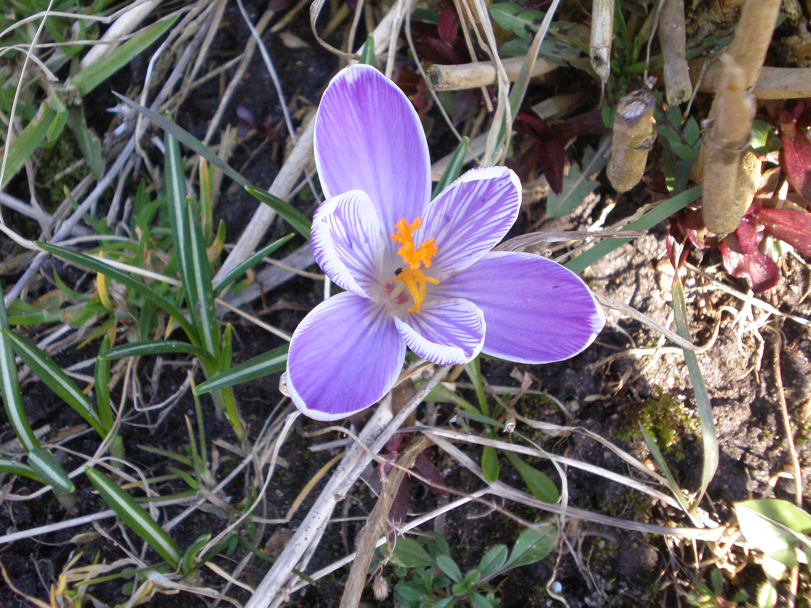 Crocus hybrida (crocus sativus atmaina) 2007.03.24 Foto: Hugo.arg